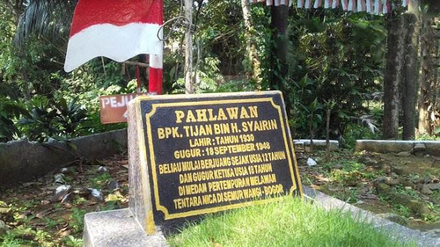 Makam Pahlawan TIjan bin H. Syairin yang terletak di Gang Pahlawan TIjan, Cimanggu Kota Bogor